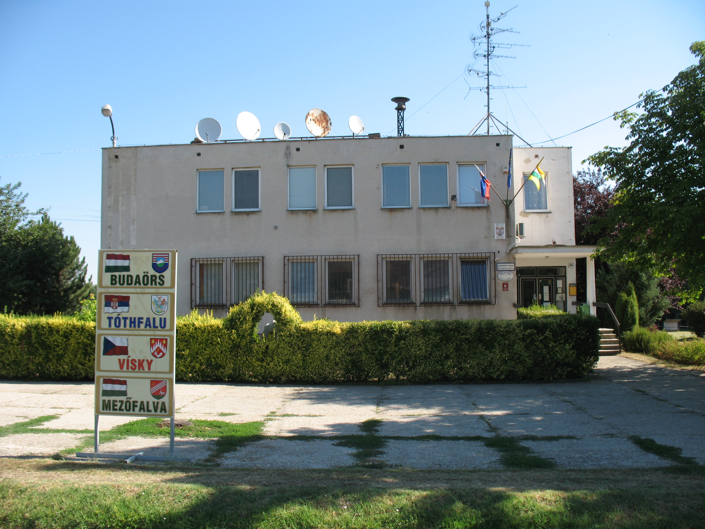 Kisújfalu